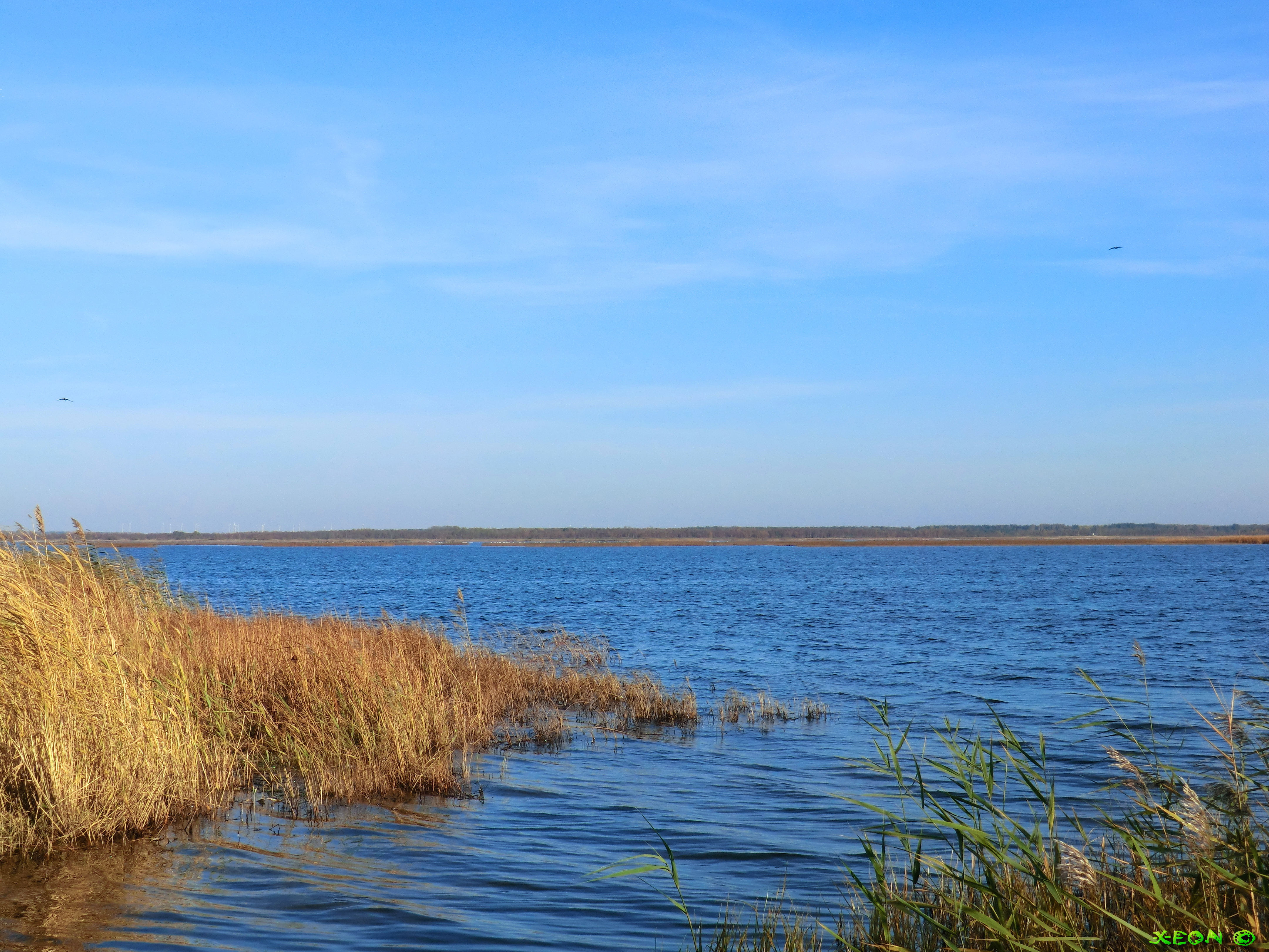 Liepajan Lake